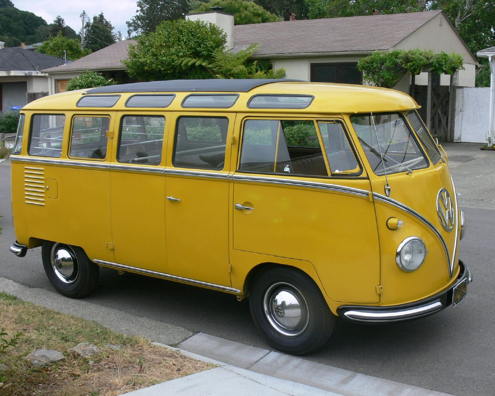 1956 Volkswagen T1 Deluxe yellow